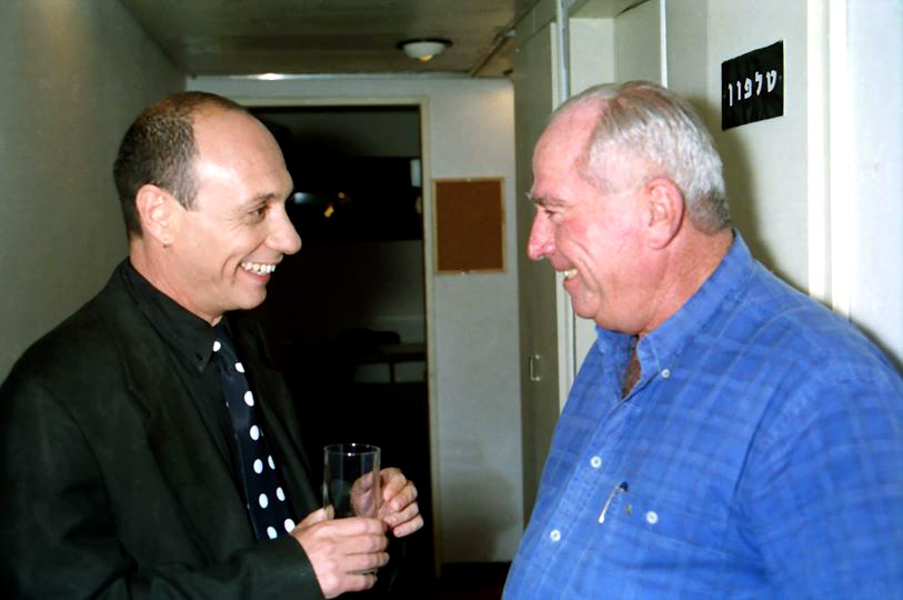 אלדד זיו ורפאל איתן רפול